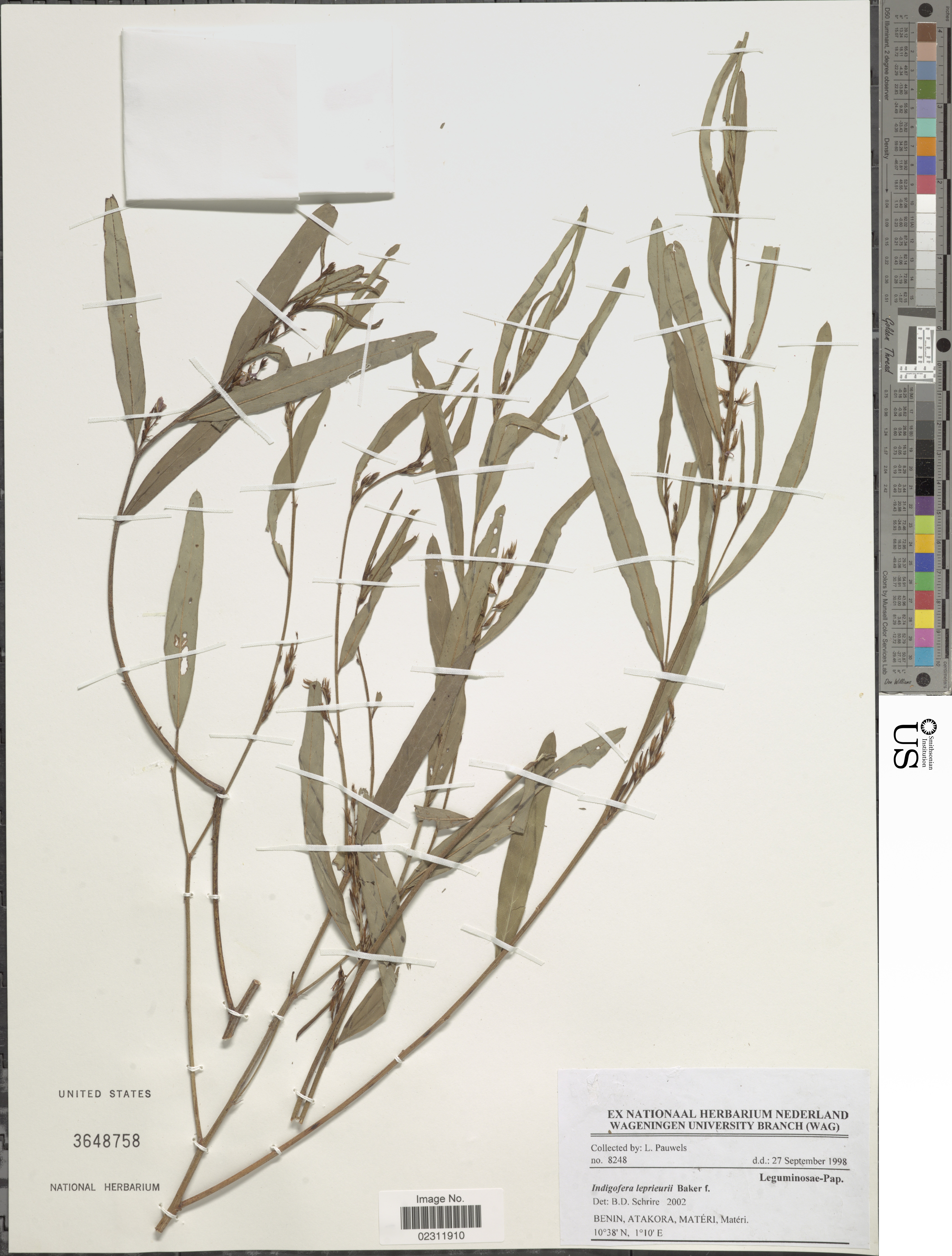 Indigofera leprieurii Baker f. Object Details Biogeographical Region 22 - West Tropical Africa Collector L. Pauwels Record Last Modified 3 Jan 2018 Specimen Count 1 Collection Date 27 Sep 1998 Barcode 02311910 USNM Number 3648758 Place Materi, Atakora, Benin, Africa Published Name Indigofera leprieurii Baker f. Taxonomy Plantae Dicotyledonae Rosales Fabaceae Faboideae NMNH - Botany Dept. Record ID nmnhbotany_13323103 Usage of Metadata (Object Detail Text) CC0 GUID (Link to Original Record)